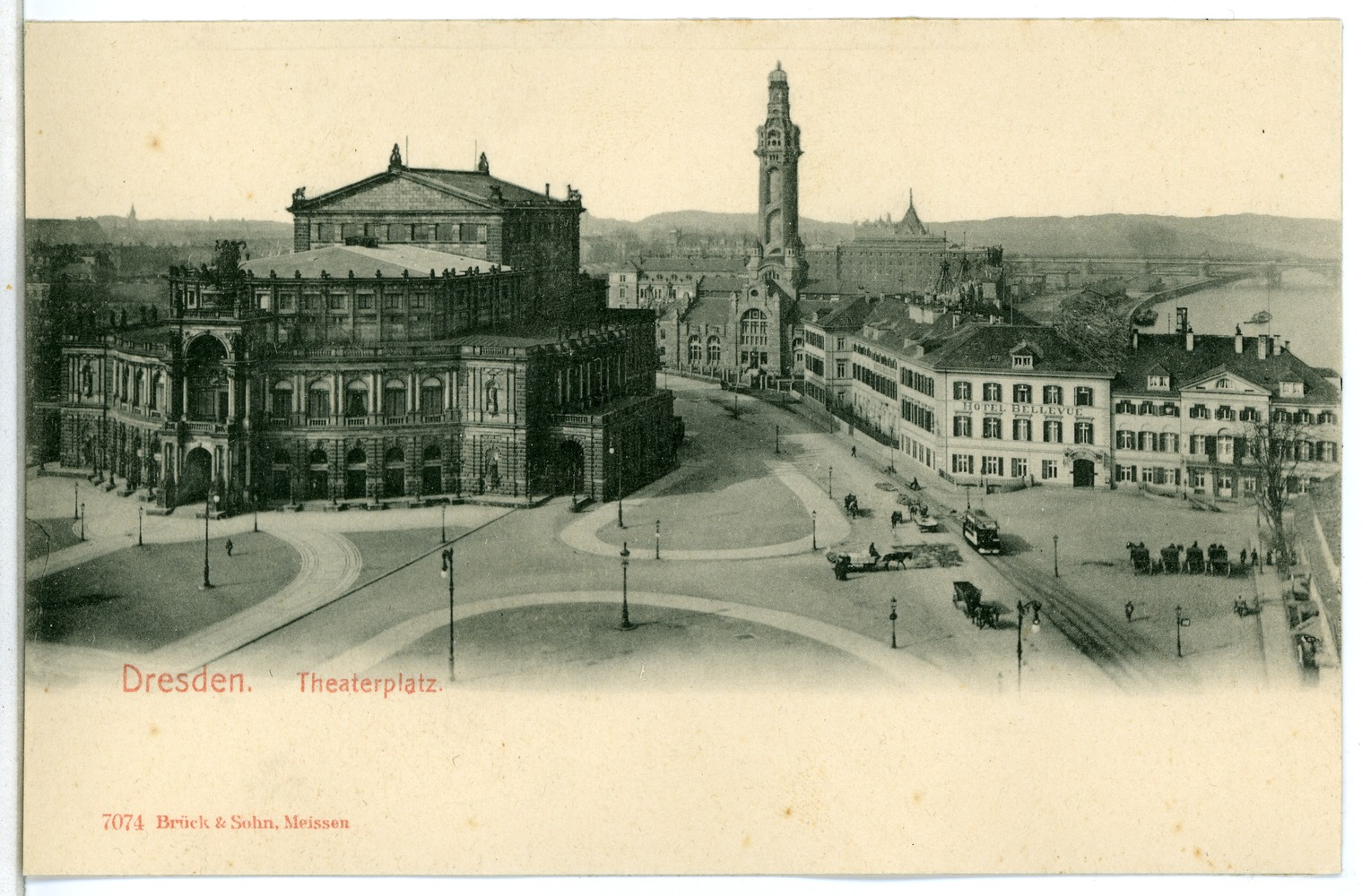 Dresden; Theaterplatz mit Semperoper This postcard is from publisher Brück & Sohn in Meißen ( This postcard has a unique number 07074 and is available in a higher resolution at the publisher. This images was uploaded in a cooperation project between Wikipedians and the publisher.